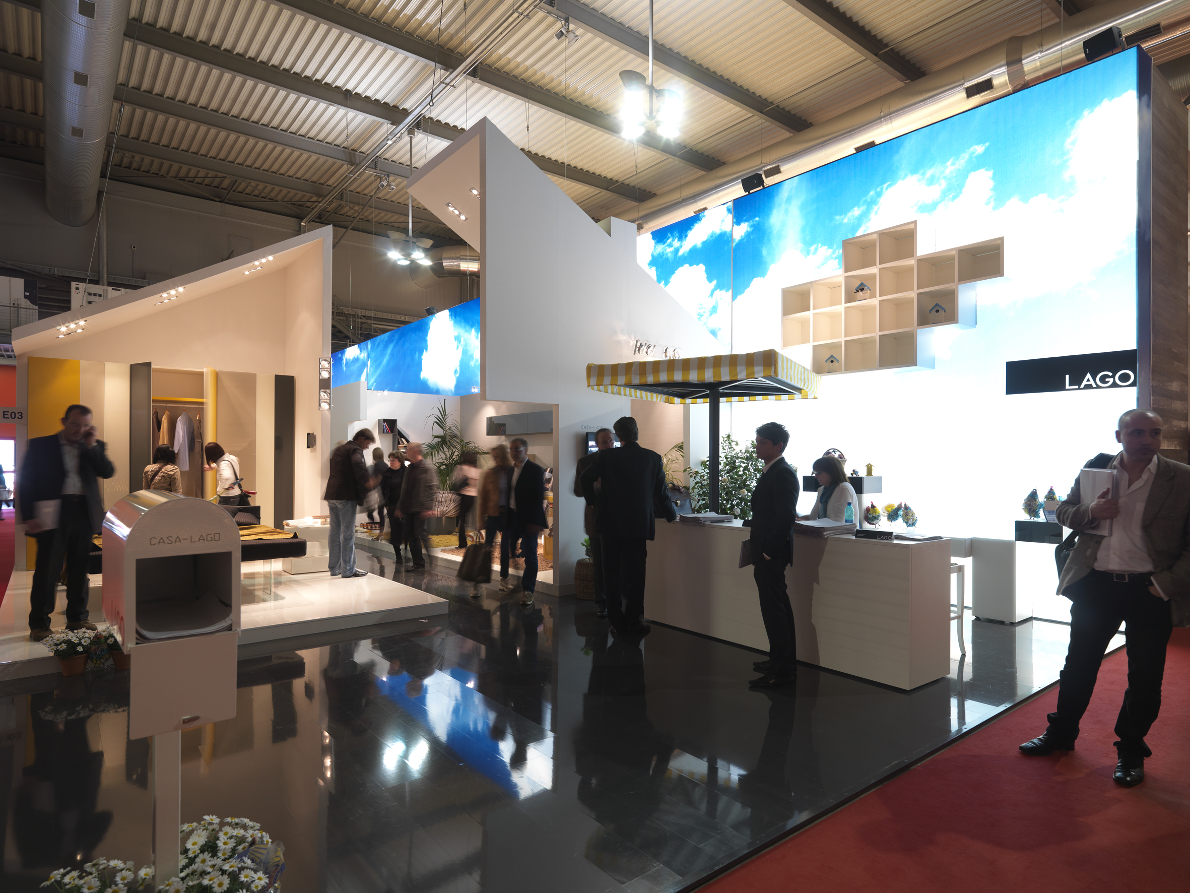 B 38550